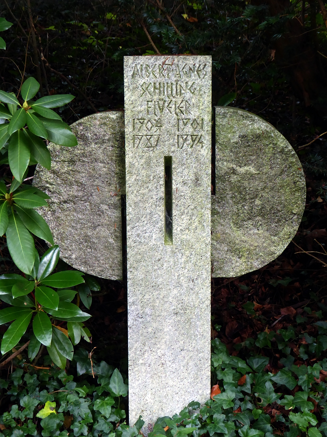 Albert Paul Schilling-Flüeler (1904–1987) Künstler, Bildhauer. Grab auf dem Friedhof Bromhübel in Arlesheim, Basel-Land